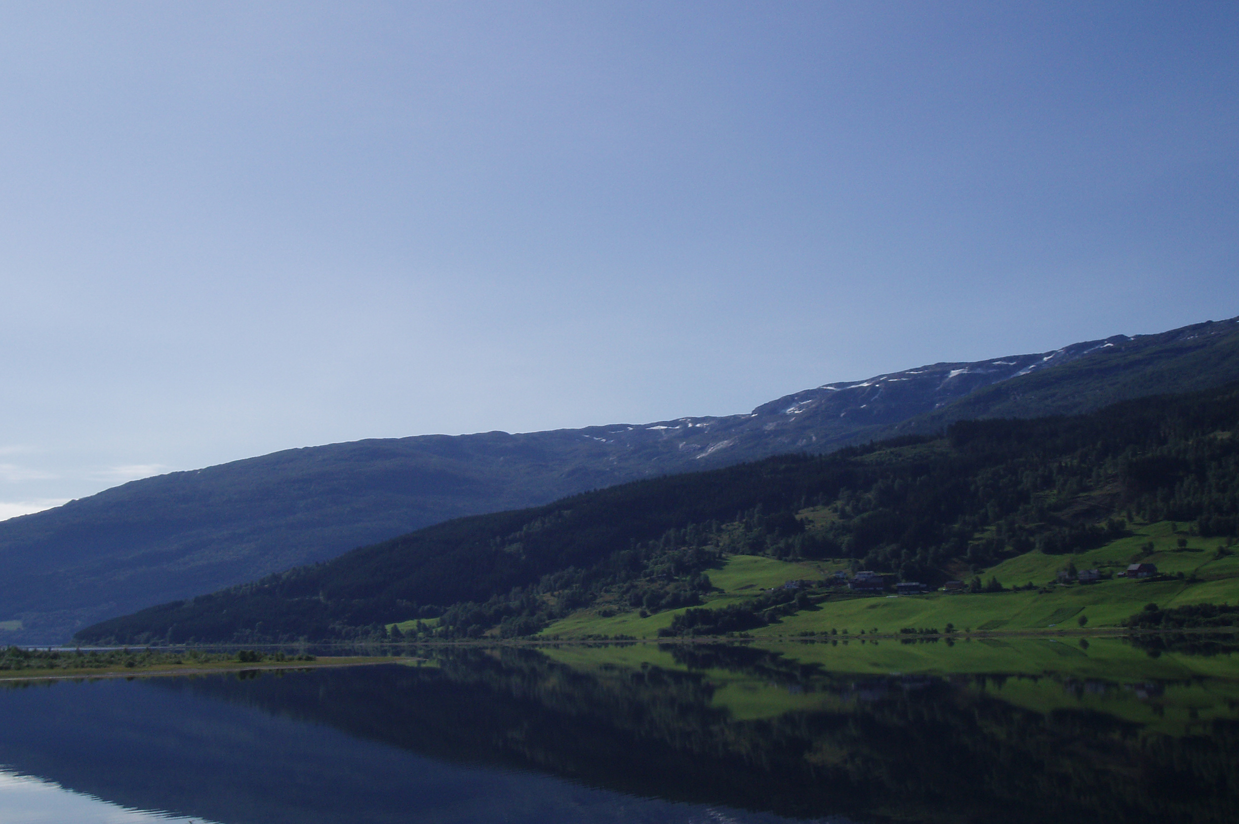 Vangsvatnet near Voss, Norway.